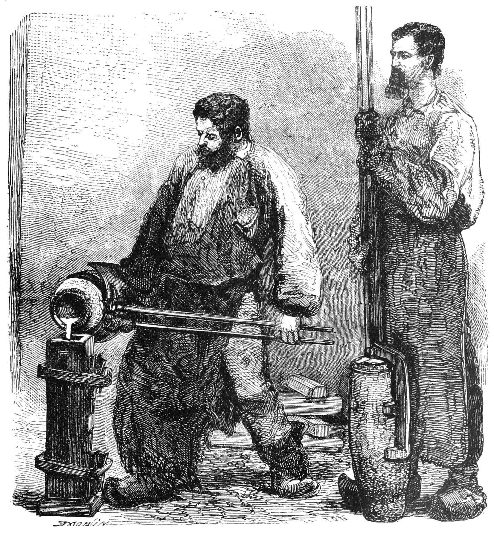 Teeming an ingot of steel